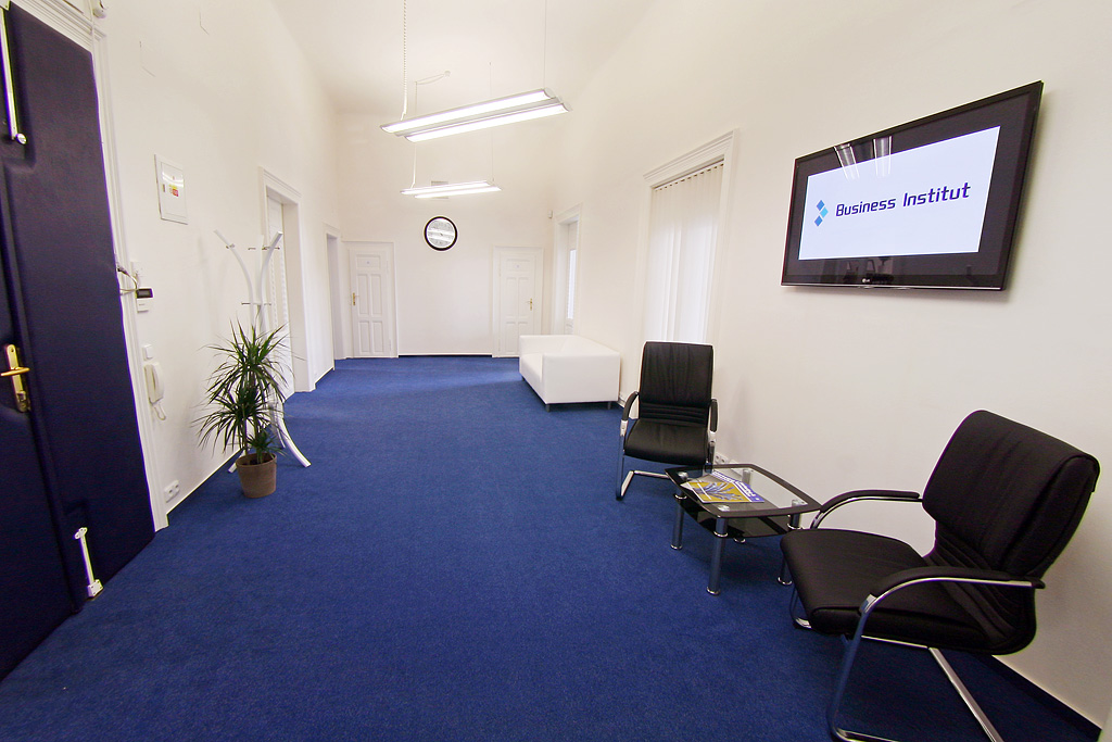 Sídlo Business Institut EDU, Praha-Vršovice, Kodaňská 558/25.